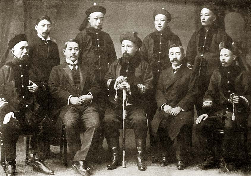 北洋海軍士官（何廣成、馬熉鈺、朱聲岡、方佑生、吳振南、王光熊）と、艦船の製造を請け負った日本の造船所の所員。